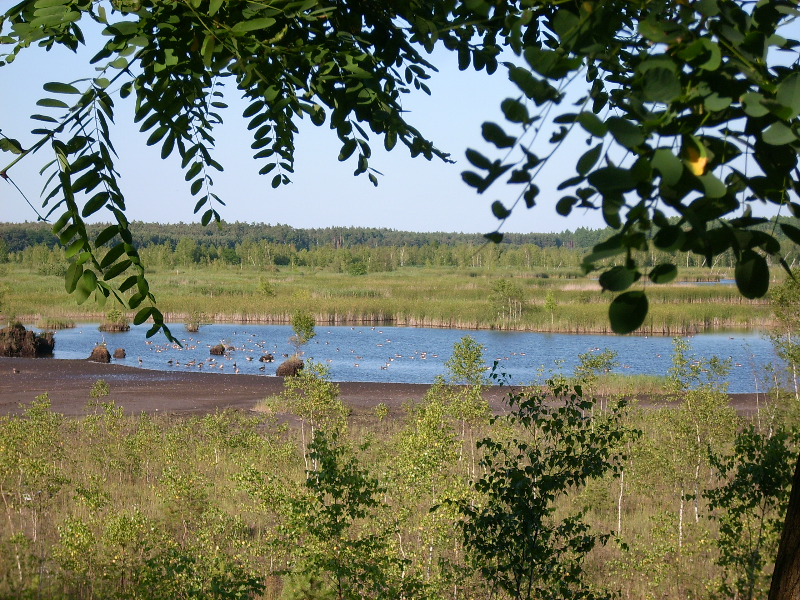 Graureihersee im Lausitzer Seenland, Landkreis Bautzen